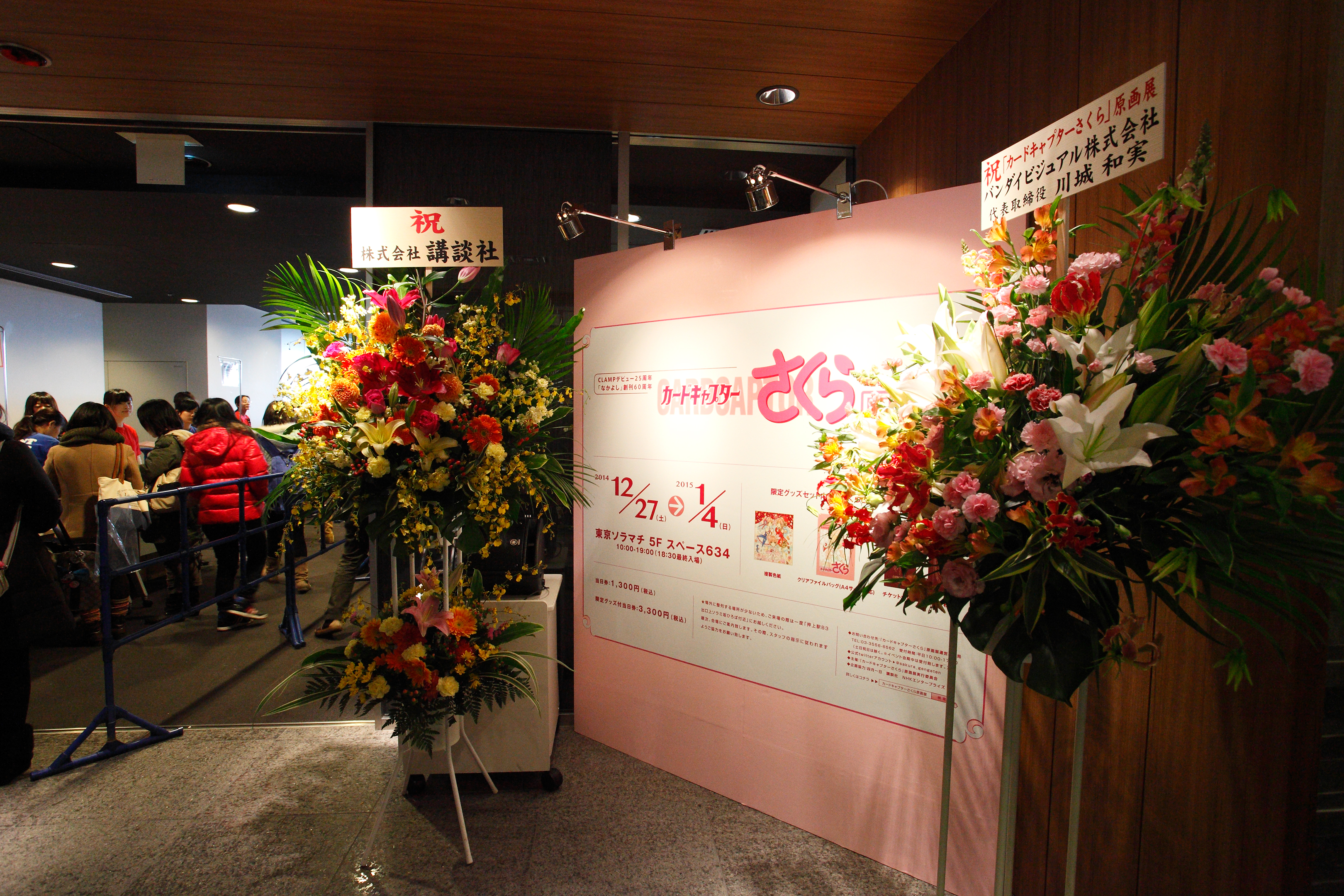 「カードキャプターさくら」原画展 2014年12月27日（土)～2015年1月4日